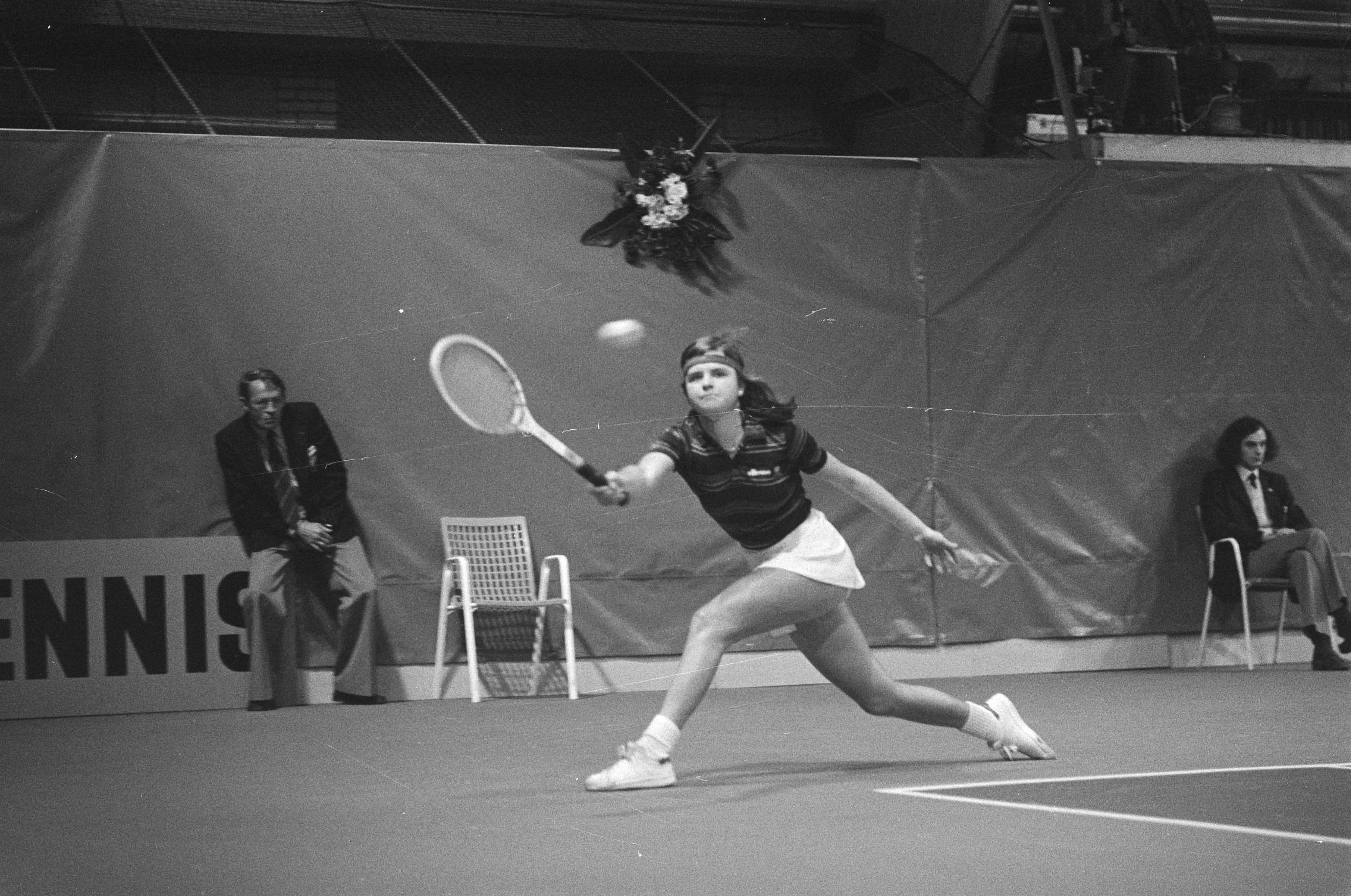 Collectie / Archief : Fotocollectie Anefo Reportage / Serie : [ onbekend ] Beschrijving : Dames prof. tennistoernooi Goldstar Amsterdam, Hana Mandlikova (Tsjecho-Slowakije) in aktie, ze won de finale tegen Ruzici Datum : 16 november 1980 Locatie : Amsterdam, Noord-Holland Trefwoorden : finales, tennis, toernooien Persoonsnaam : ruzici Fotograaf : Croes, Rob C. / Anefo Auteursrechthebbende : Nationaal Archief Materiaalsoort : Negatief (zwart/wit) Nummer archiefinventaris : bekijk toegang 2.24.01.05 Bestanddeelnummer : 931-1500